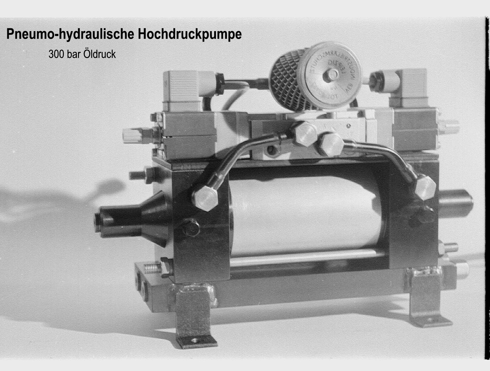 Prototyp eines Pneumo-hydraulischen Druckübersetzers 32 MPa